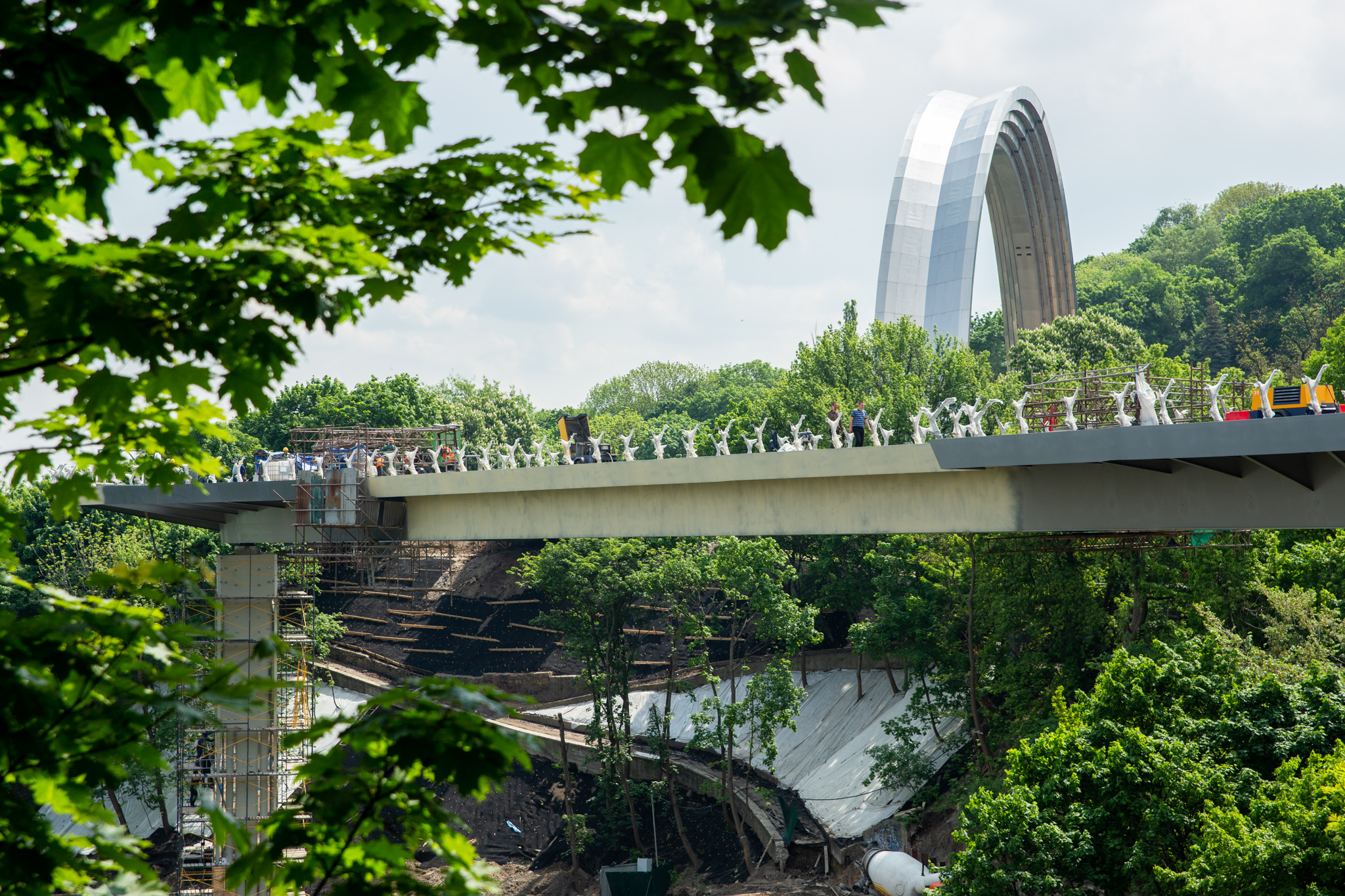 Будівництво-пішохідно велосипедного мосту у Києві